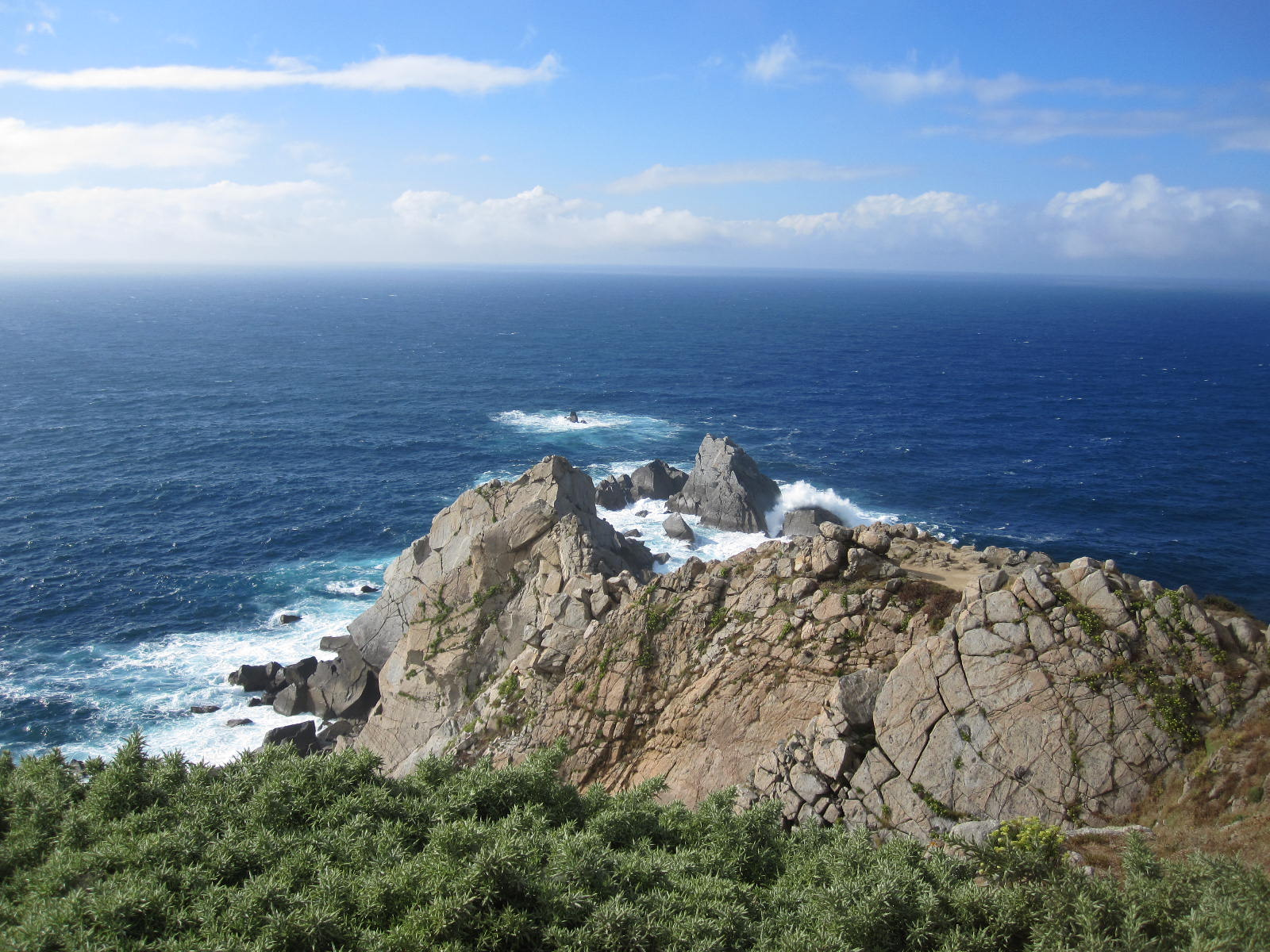 Estaca de Bares This is a photography of a Special Area of Conservation in Spain with the ID: ES1110010. Natura2000 entry, EEA entry